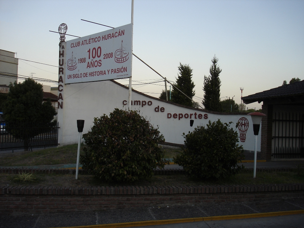 Frente del campo de deportes Jorge Newbery